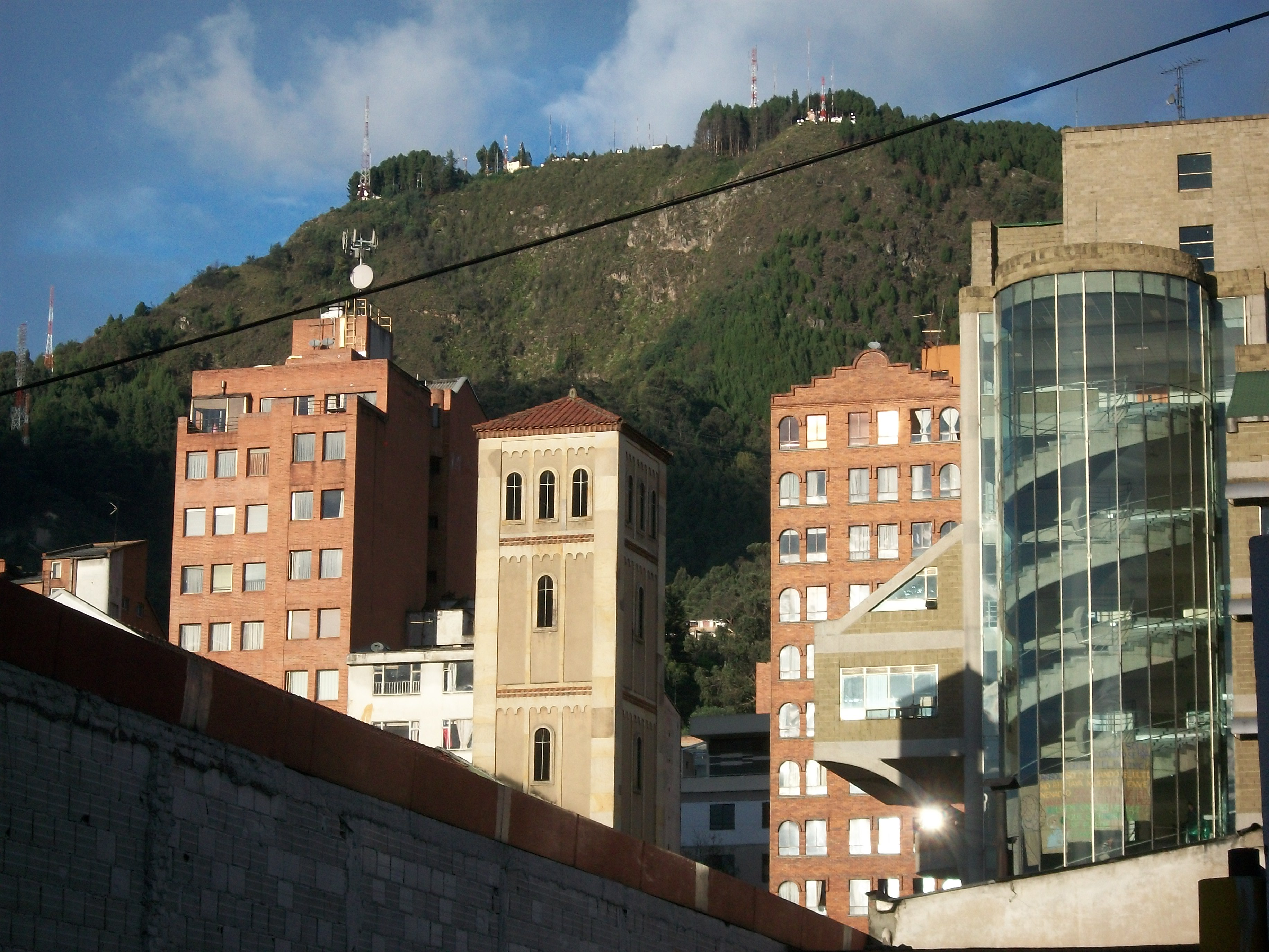 Universidad Distrital Francisco José de Caldas, sede Chapinero.